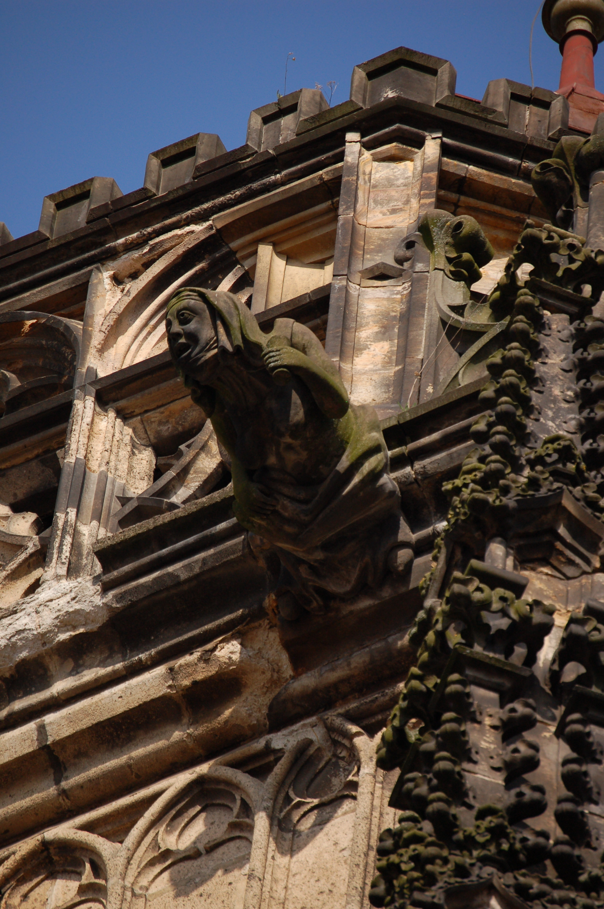 Gargouille de la cathédrale de Košice Chrlič Dóm svätej Alžbety Košice